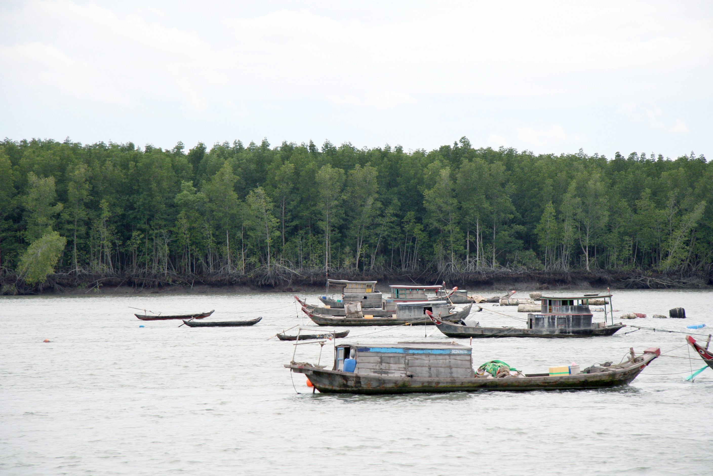 Rừng Sác.